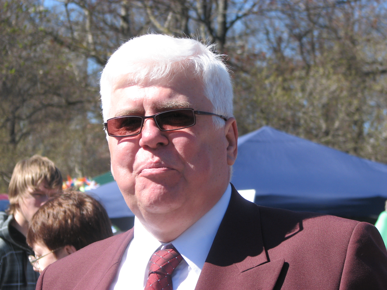 Kalle Mihkels Heateo festivalil Tammsaare pargis